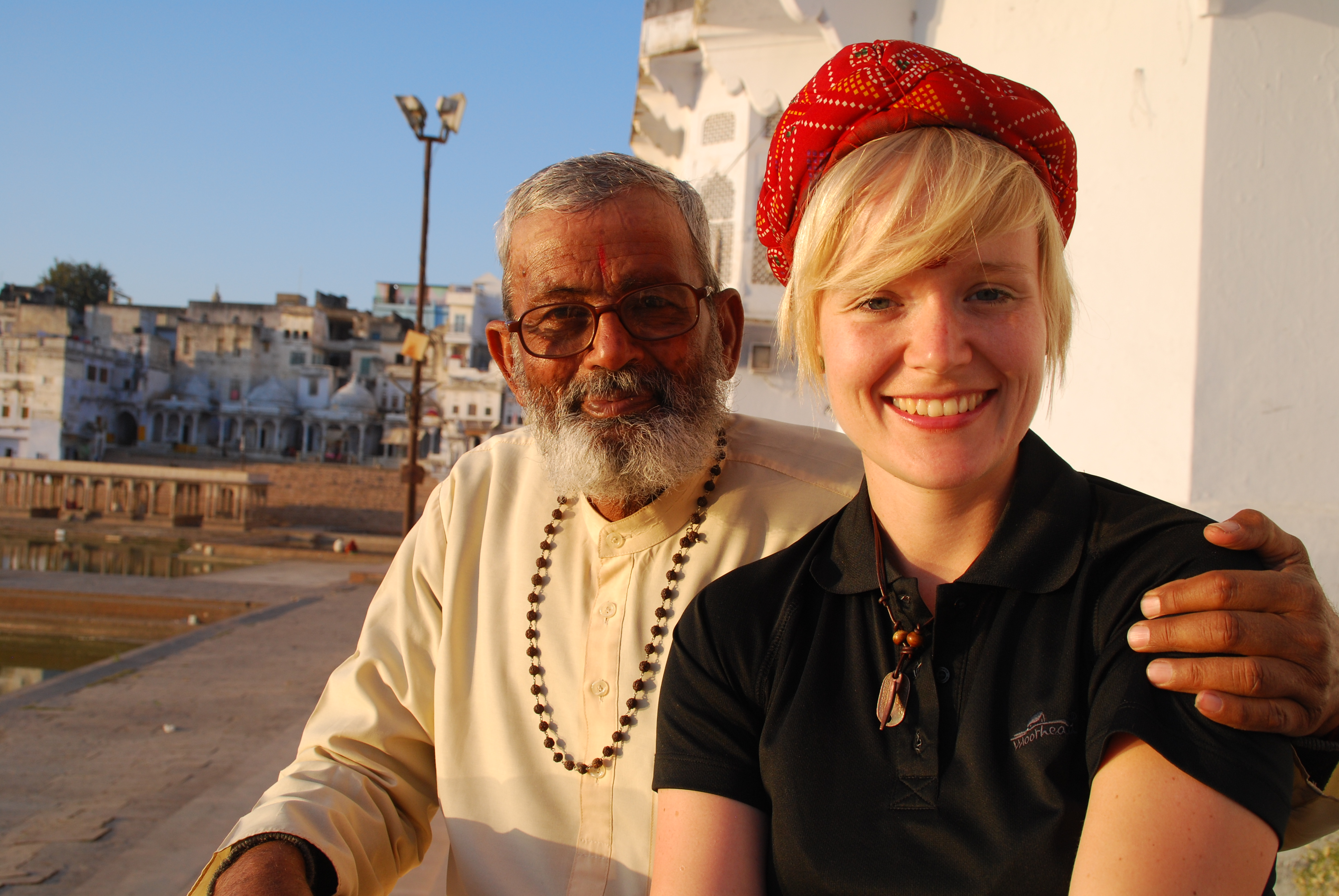 Pushkar Fair India